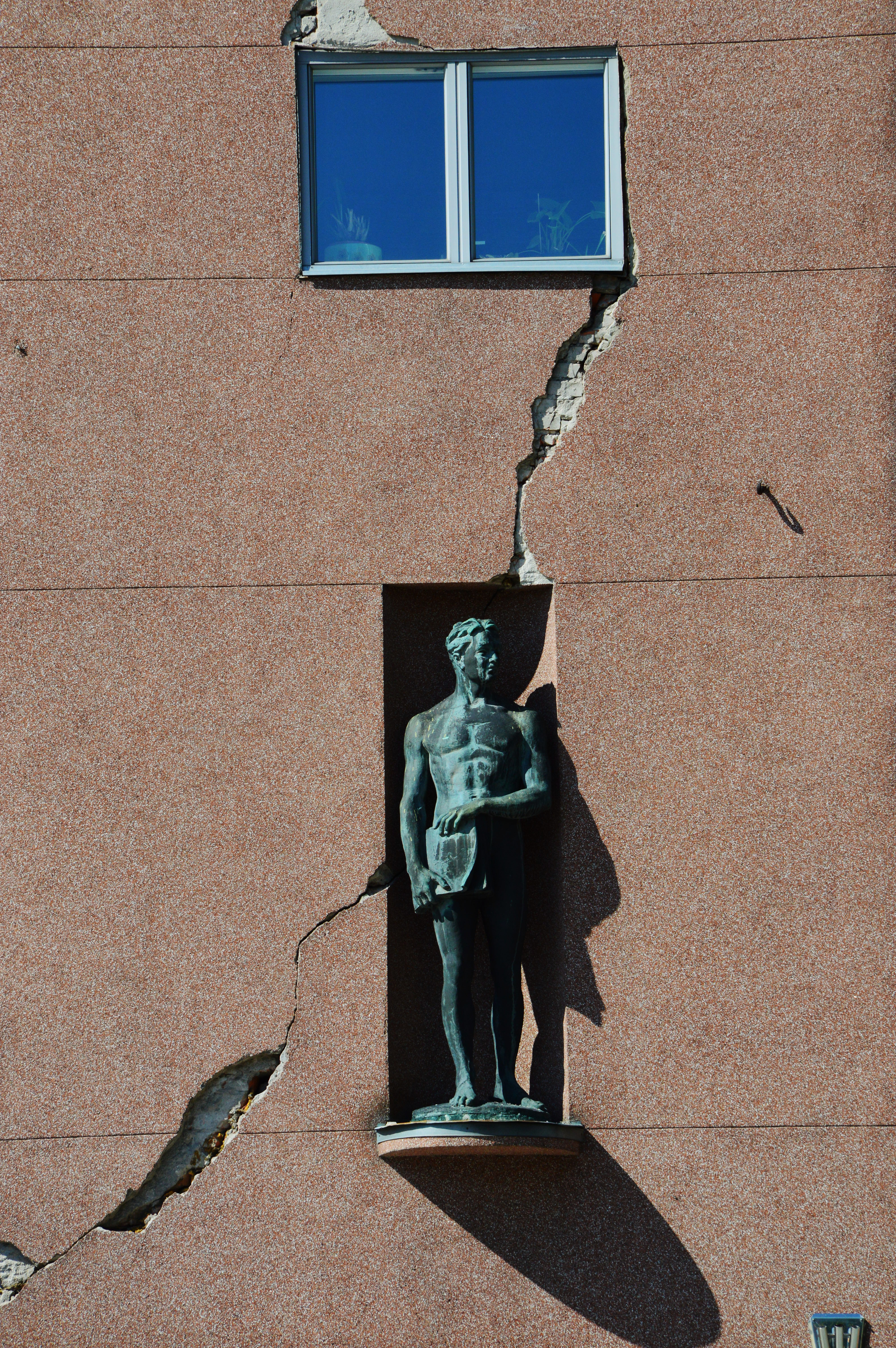 Skulptuur Tallinna kunstihoone seinal.